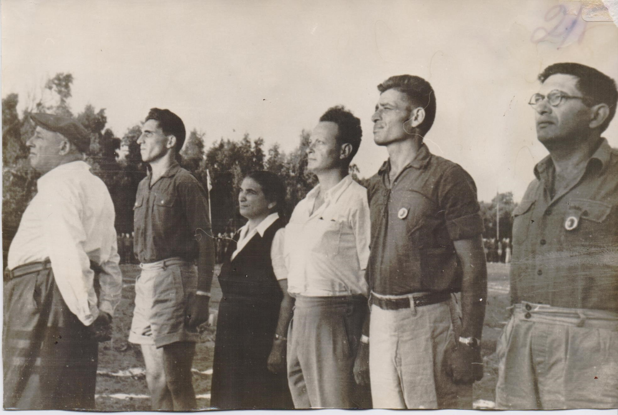 עדה יגורי (עומדת שלישית משמאל) עדה יגורי, אוסף נח ועדה יגורי, ארכיון יגור